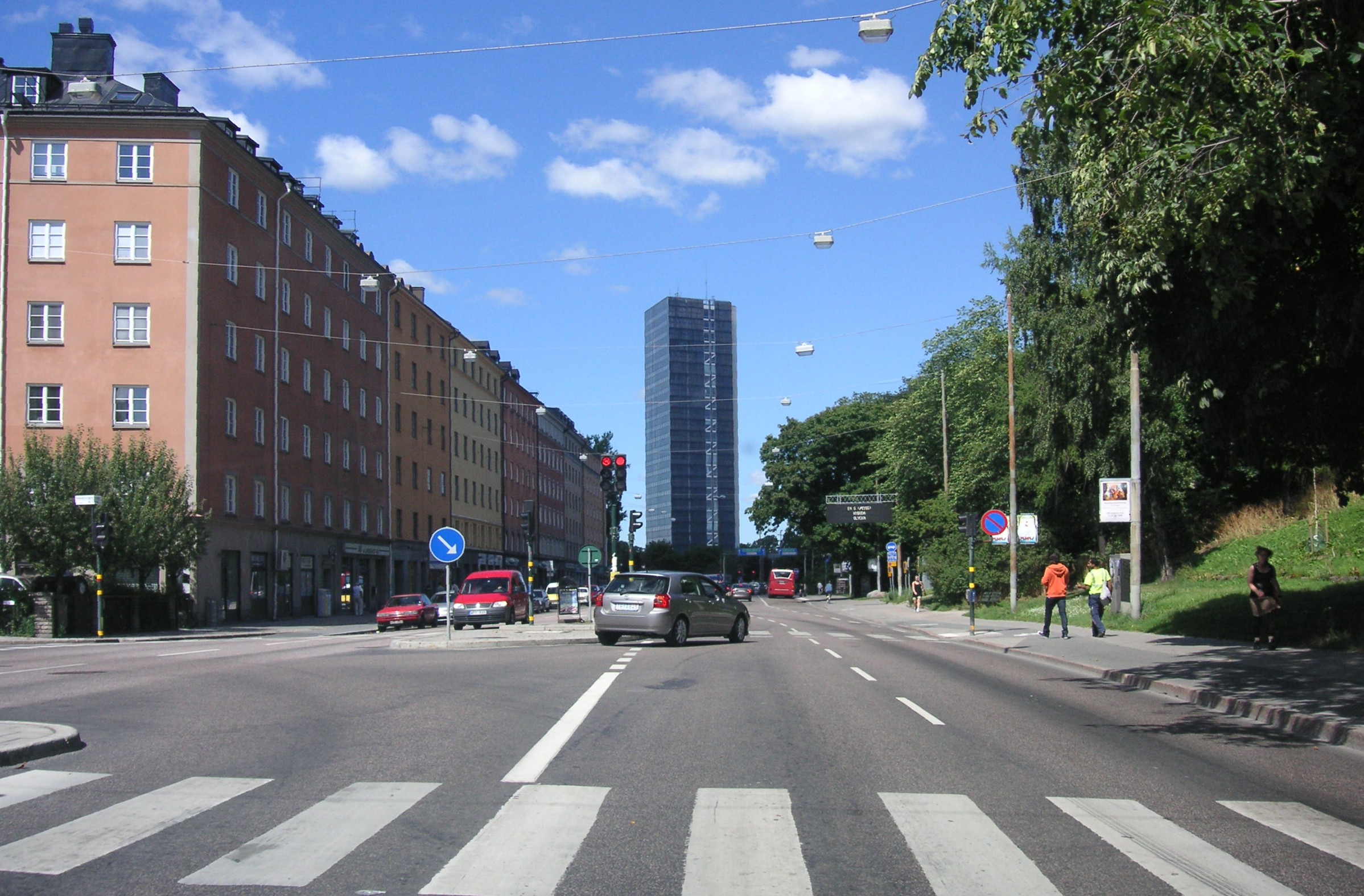 Sveavägen i Stockholm, mot norr i höjd med Vanadisvägen, i bakgrunden syns Wenner-Gren Center